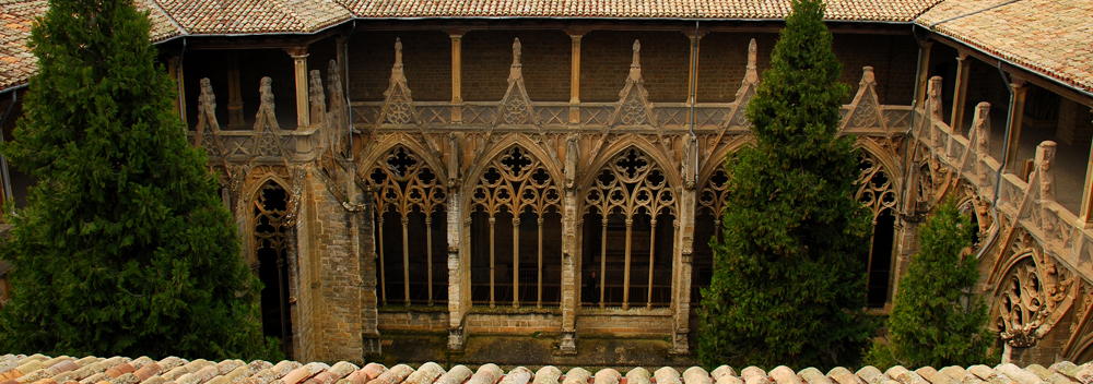 Vista sperior del claustro gótico de la catedral de Pamplona